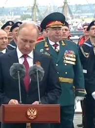 Президент РФ В. В. Путин и генералитет на военном параде в Севастополе, 9 мая 2014 года.